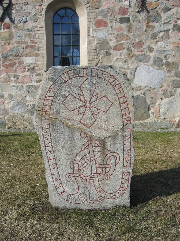 Runstenen U47, Lovö kyrka. U 47 är en av fem runstenar som är uppställda vid Lovö kyrka. Texten lyder: "Torgils och Sihnjut de reste stenen efter Vig, sin fader."